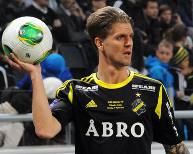 Martin Lorentzson during the 2013 match AIK-Malmö FF